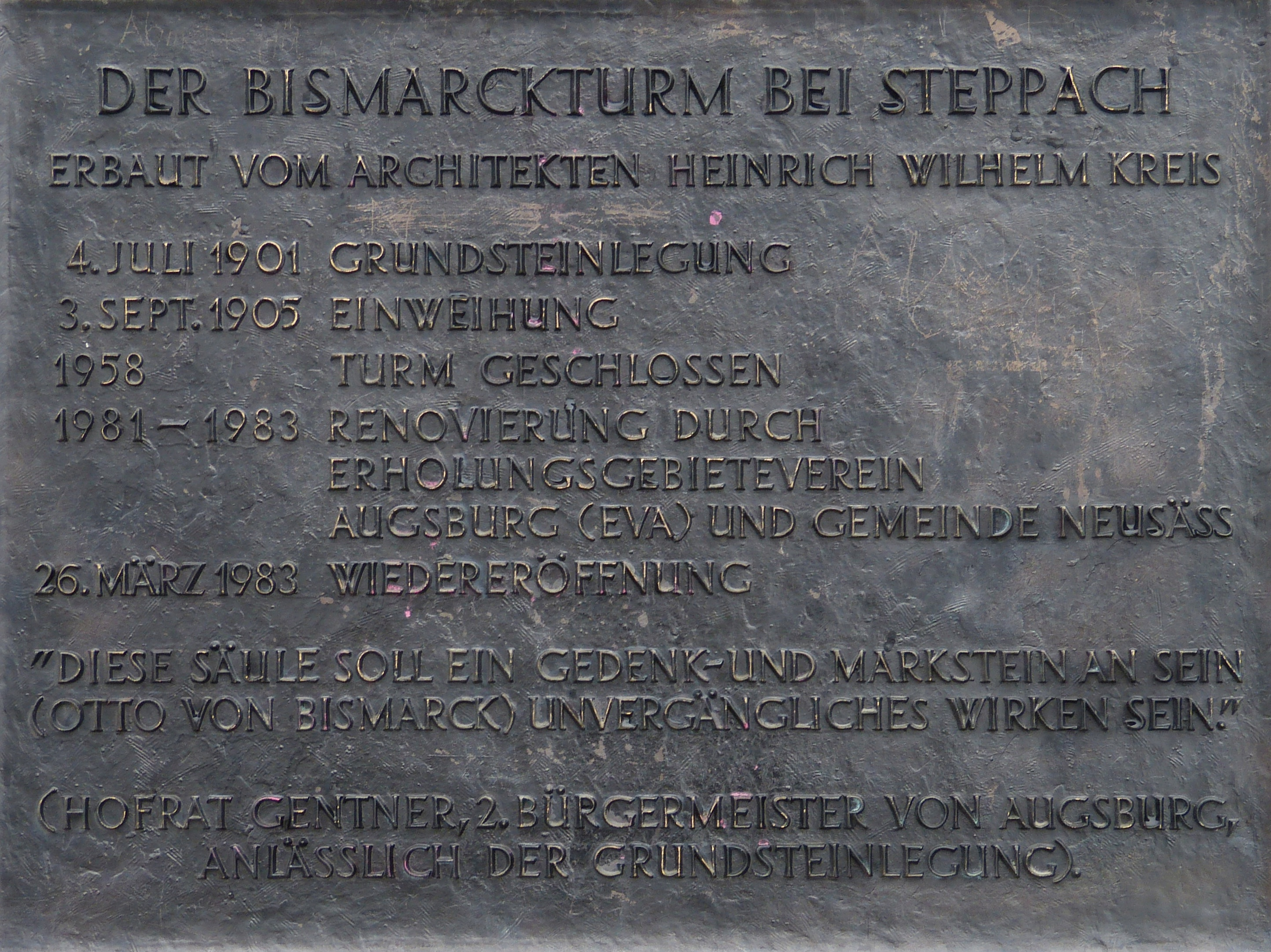 Informationstafel am Bismarckturm bei Steppach.